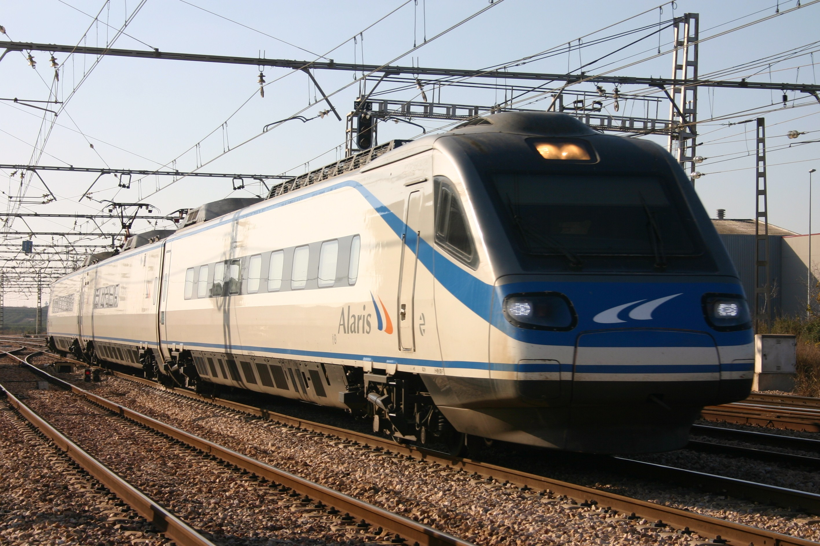 Alaris ETR-490 proceding from Madrid Puerta de Atocha entering to Silla